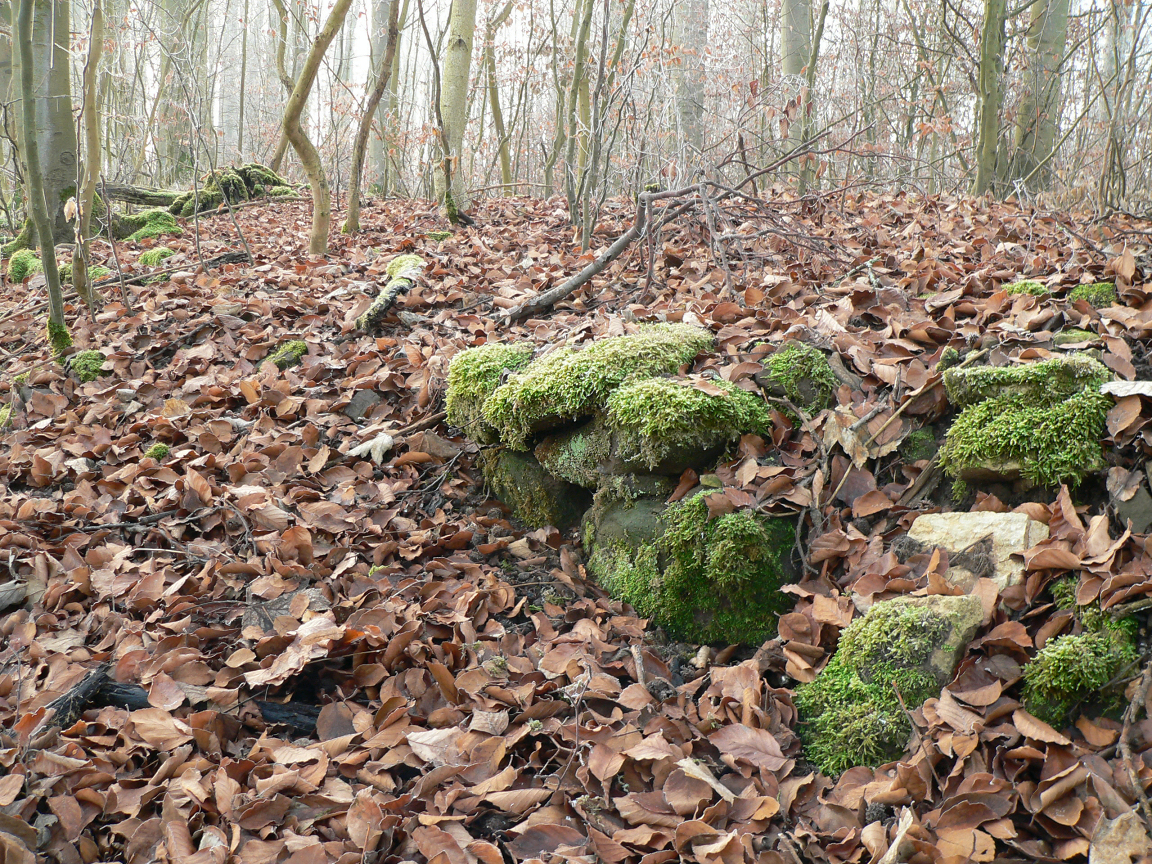 Hüburg, Teil des 190 Meter langen Mauerfundaments auf der Ostseite